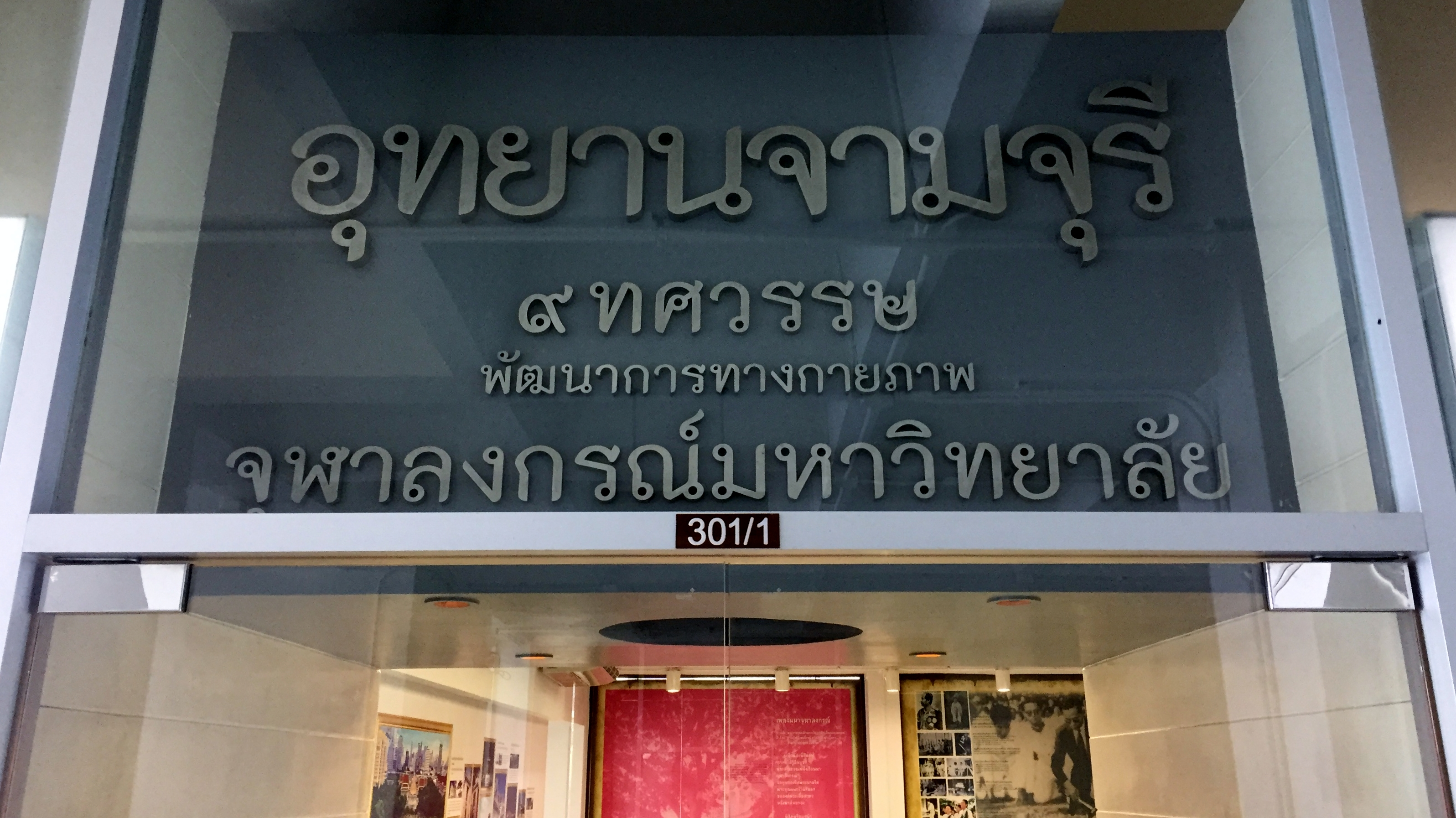 ป้ายหน้าห้องจัดแสดงชั้น 3 ห้องอุทยานจามจุรี